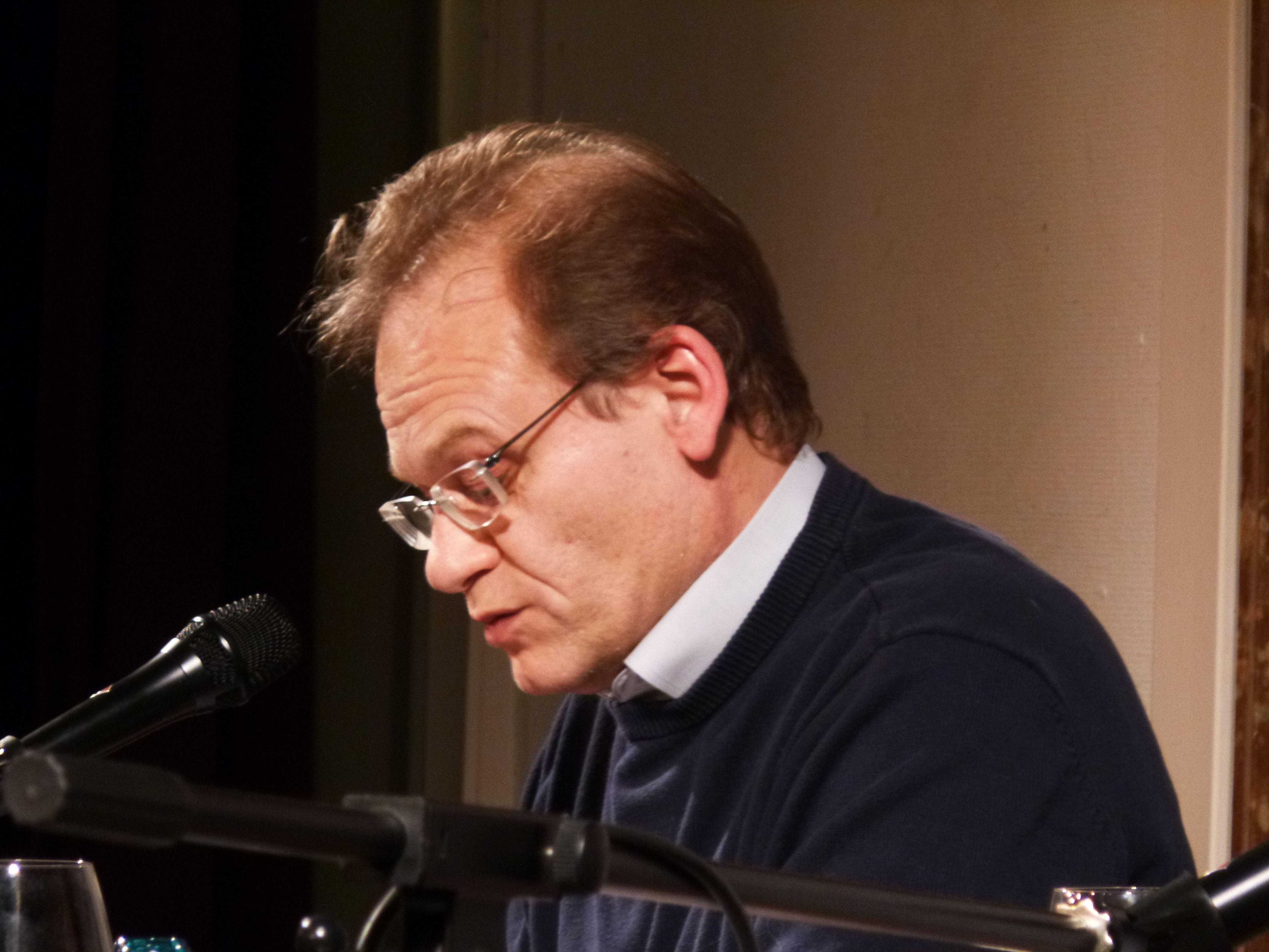 Der Übersetzer Gerd Busse liest Das Büro (Essen, Grillo-Theater, 2013)